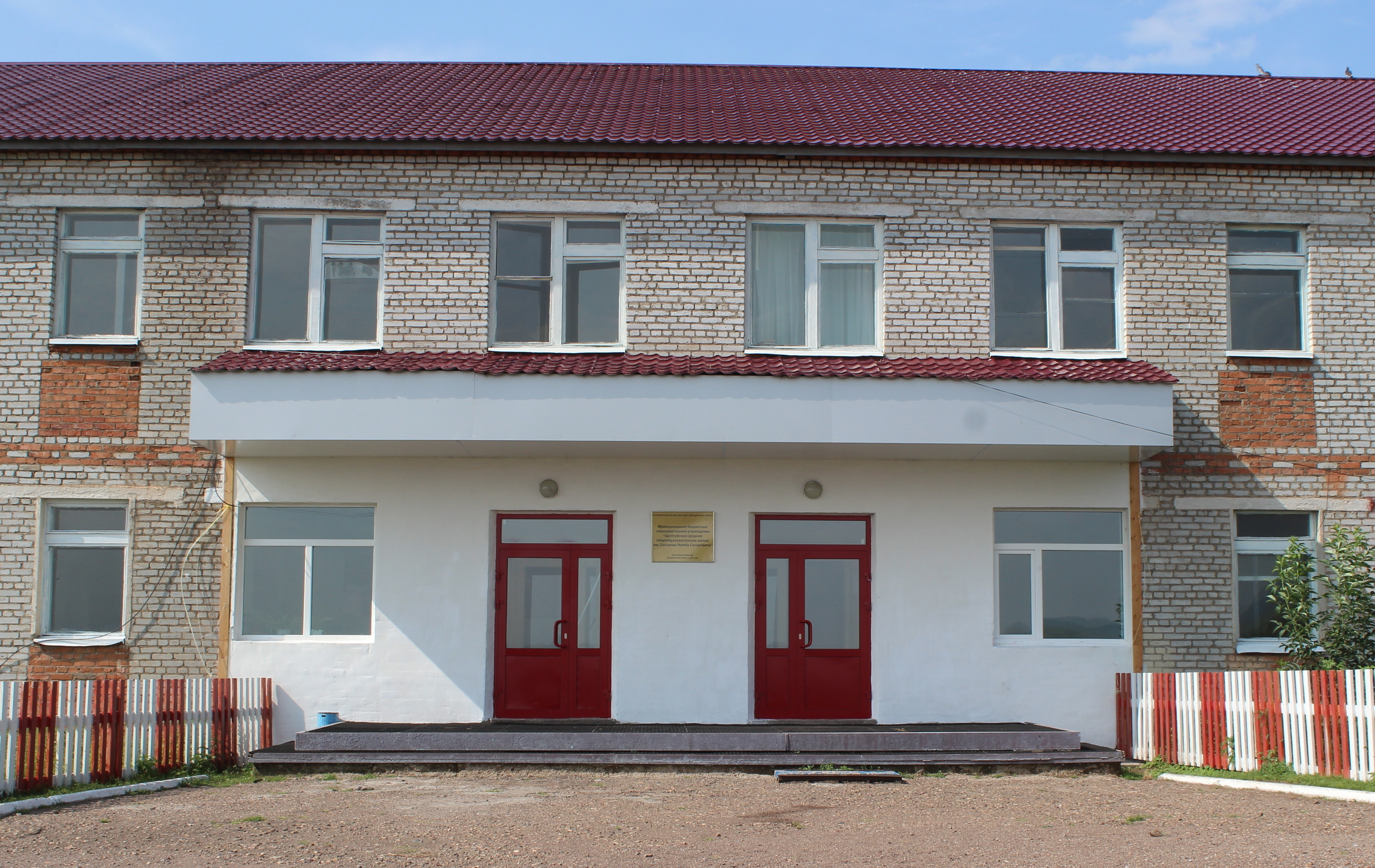 Фасад Цагатуйской средней общеобразовательной школы. Бурятия, Джидинский район